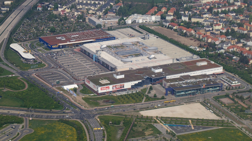 Luftbildaufnahme vom erweiterten ELBEPARK Dresden